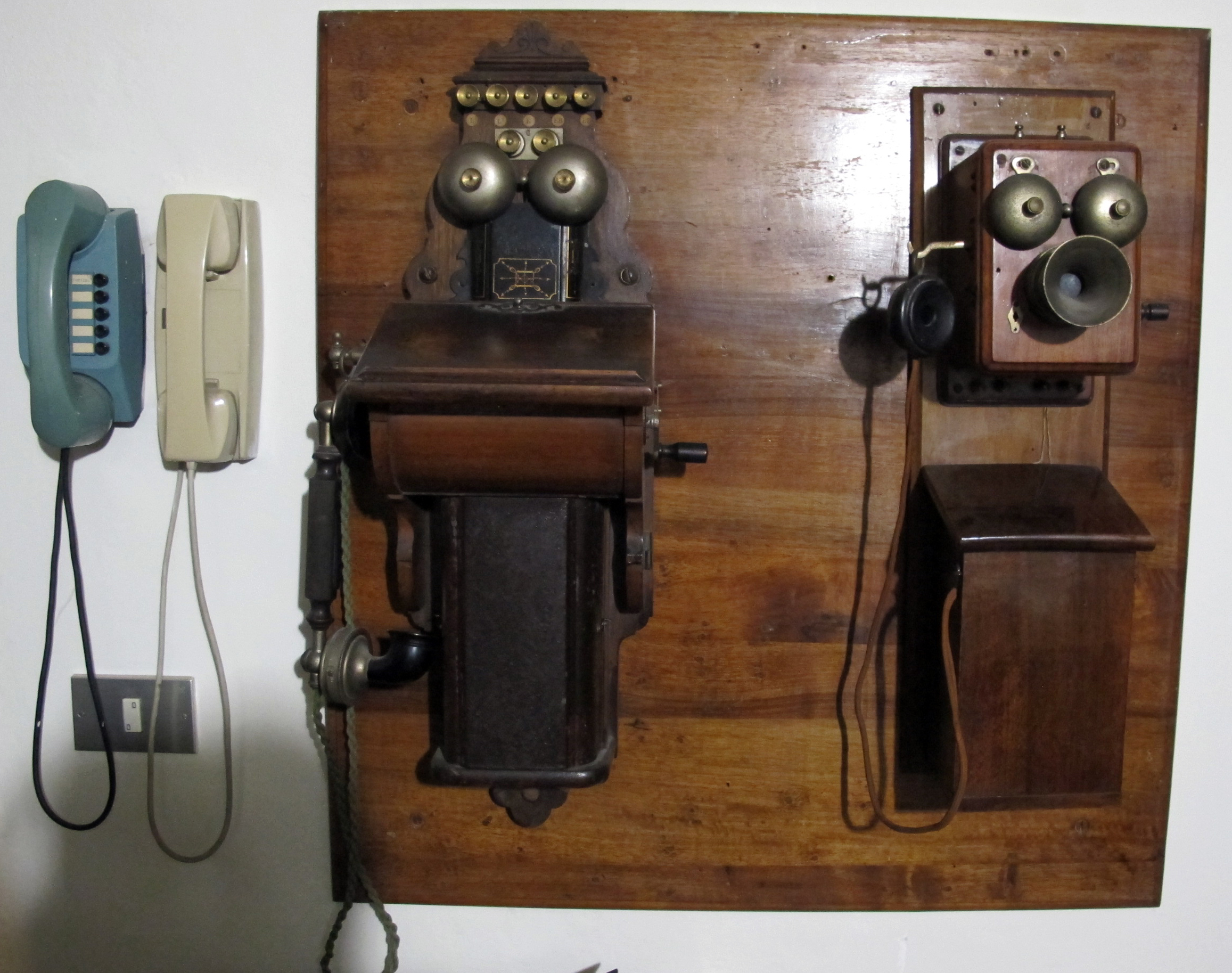 Osservatorio ximeniano, antichi telefoni